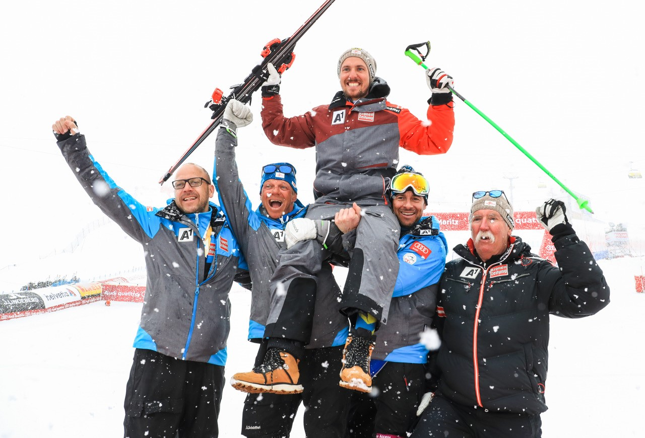 Marcel Hirscher, alpine Skier, World Championsship, St. Moritz, mit Stefan Illek, Michael Pircher, Josef Percht und Ferdinand Hirscher